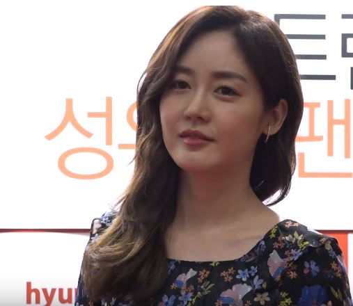 성유리가 10일 오후 인천광역시 송도 컨벤시아에서 패션브랜드 팬사인회를 진행했다.